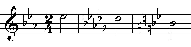 zenei módosítójelek - előjegyzésváltás 1.